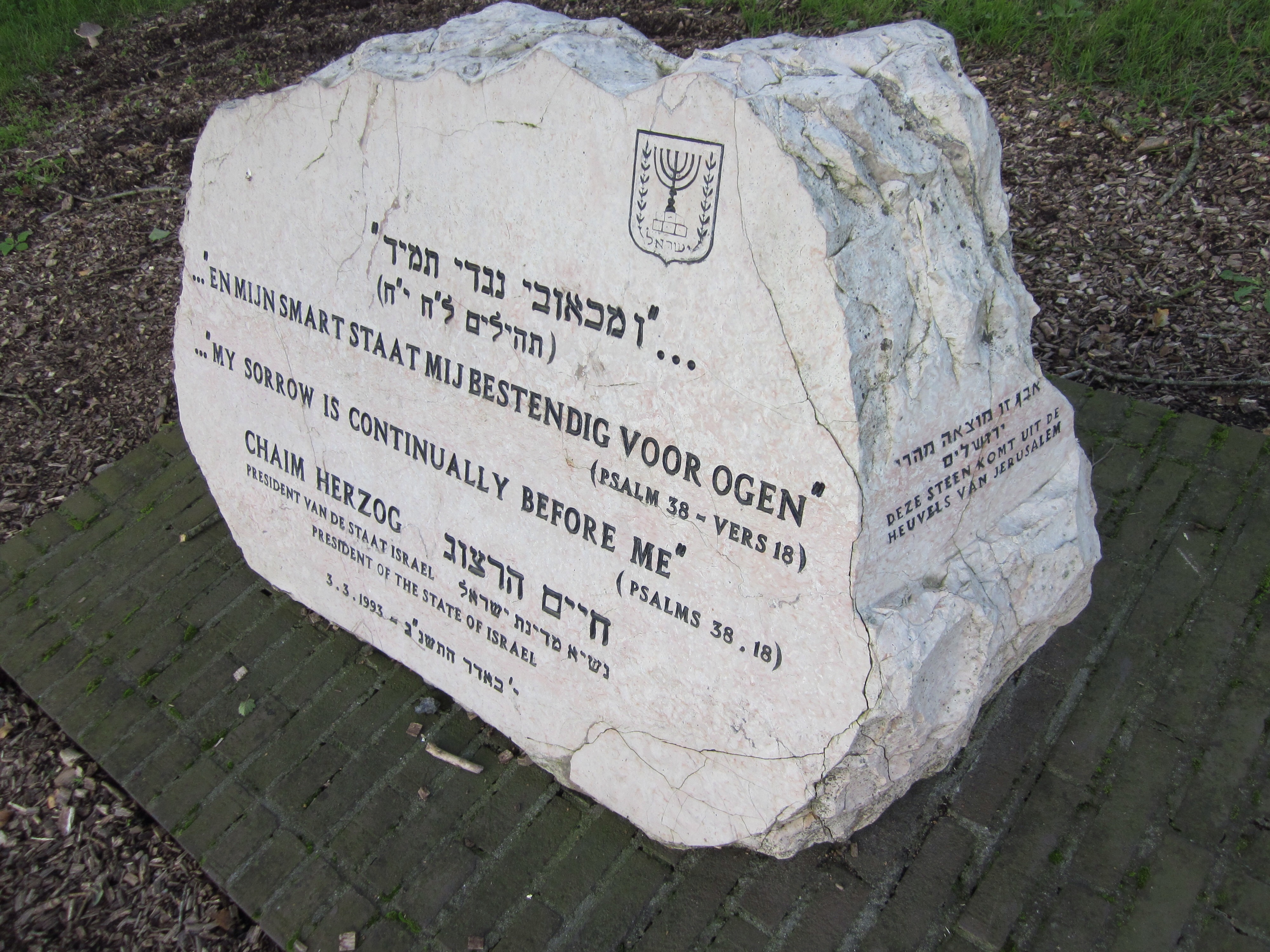 'Jerusalem Stone' In kamp Westerbork, Hooghalen. Gemaakt in 2010 tijdens onze vakantie in Drenthe.